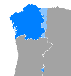 Idioma gallego Donde se habla de forma mayoritaria Donde se habla de forma minoritaria La zona rayada está en discusión.